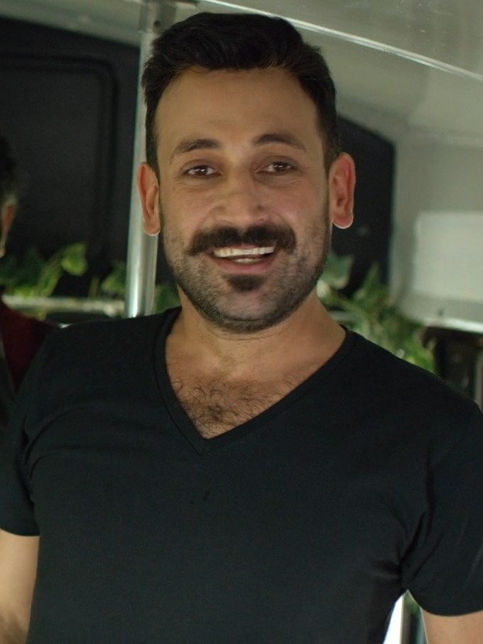 "İlk Buluşma" televizyon programı tanıtımında Sinan Çalışkanoğlu